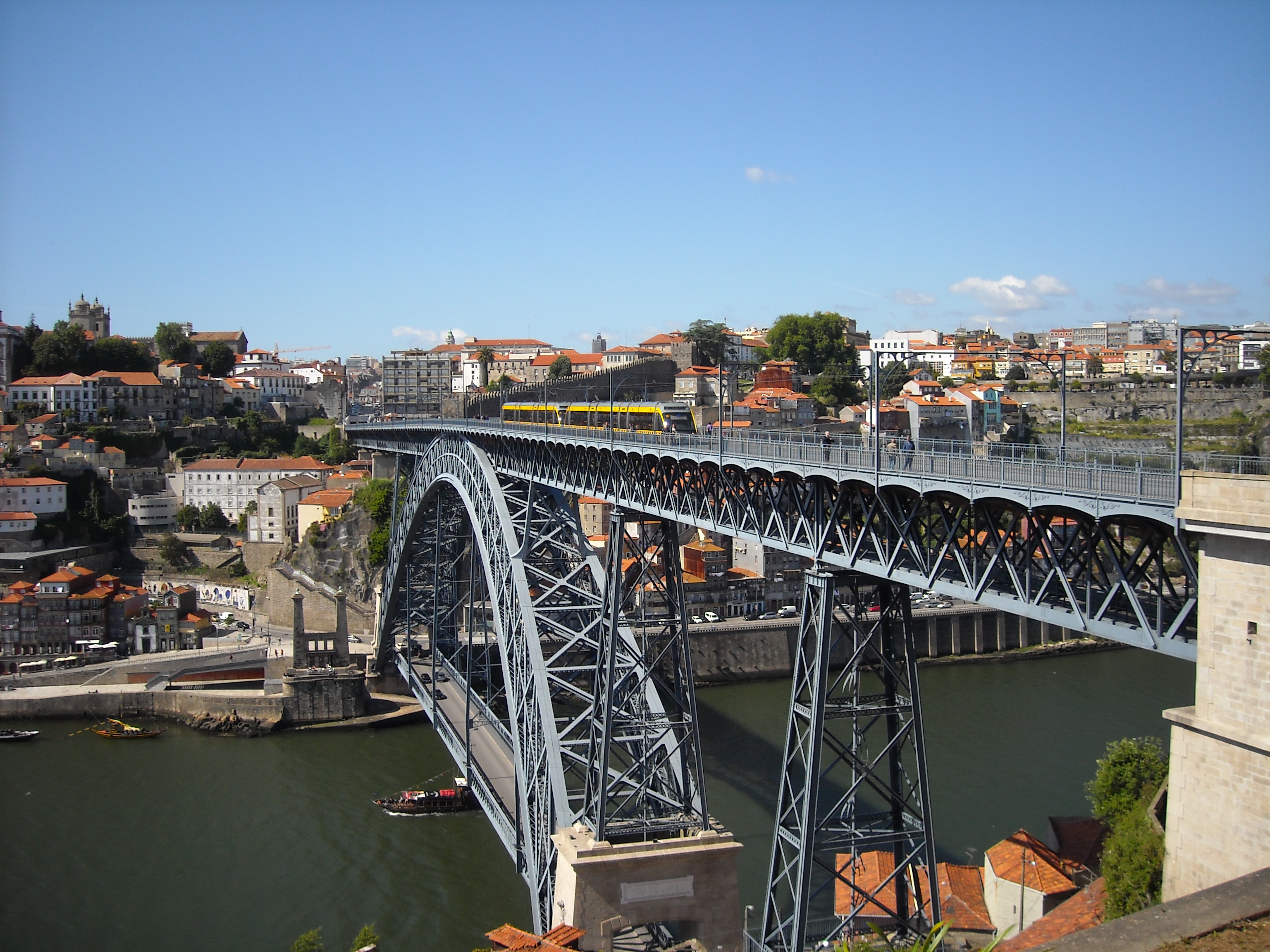 A Ponte Dom Luís I, que liga a cidade do Porto a Vila Nova de Gaia.